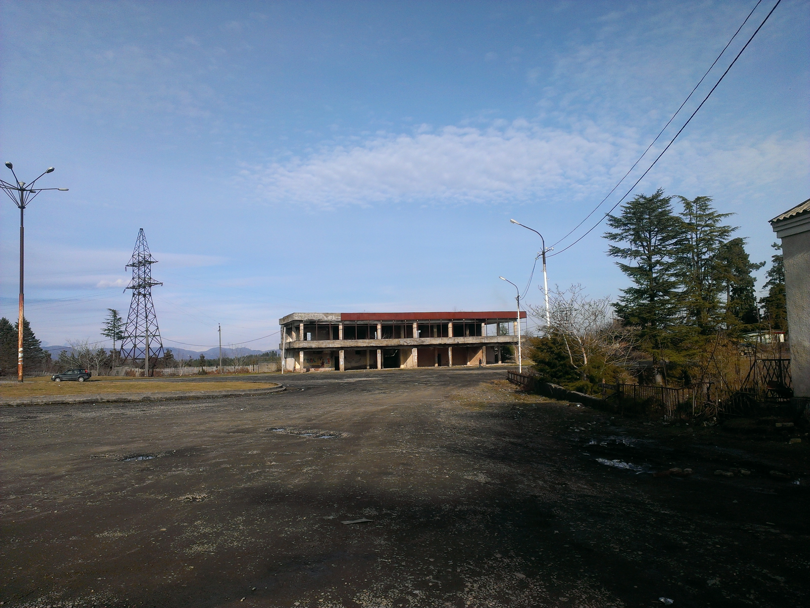 center